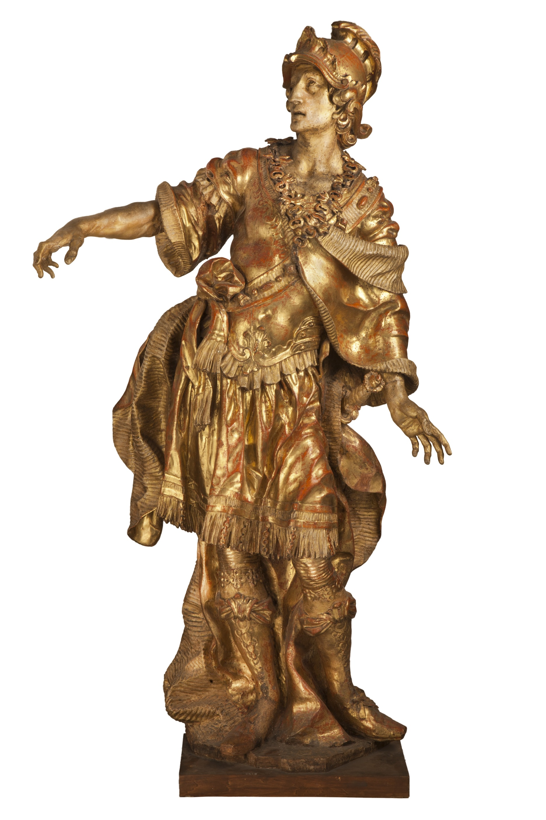 Socha svatého Konstantina od Ondřeje Schweigla